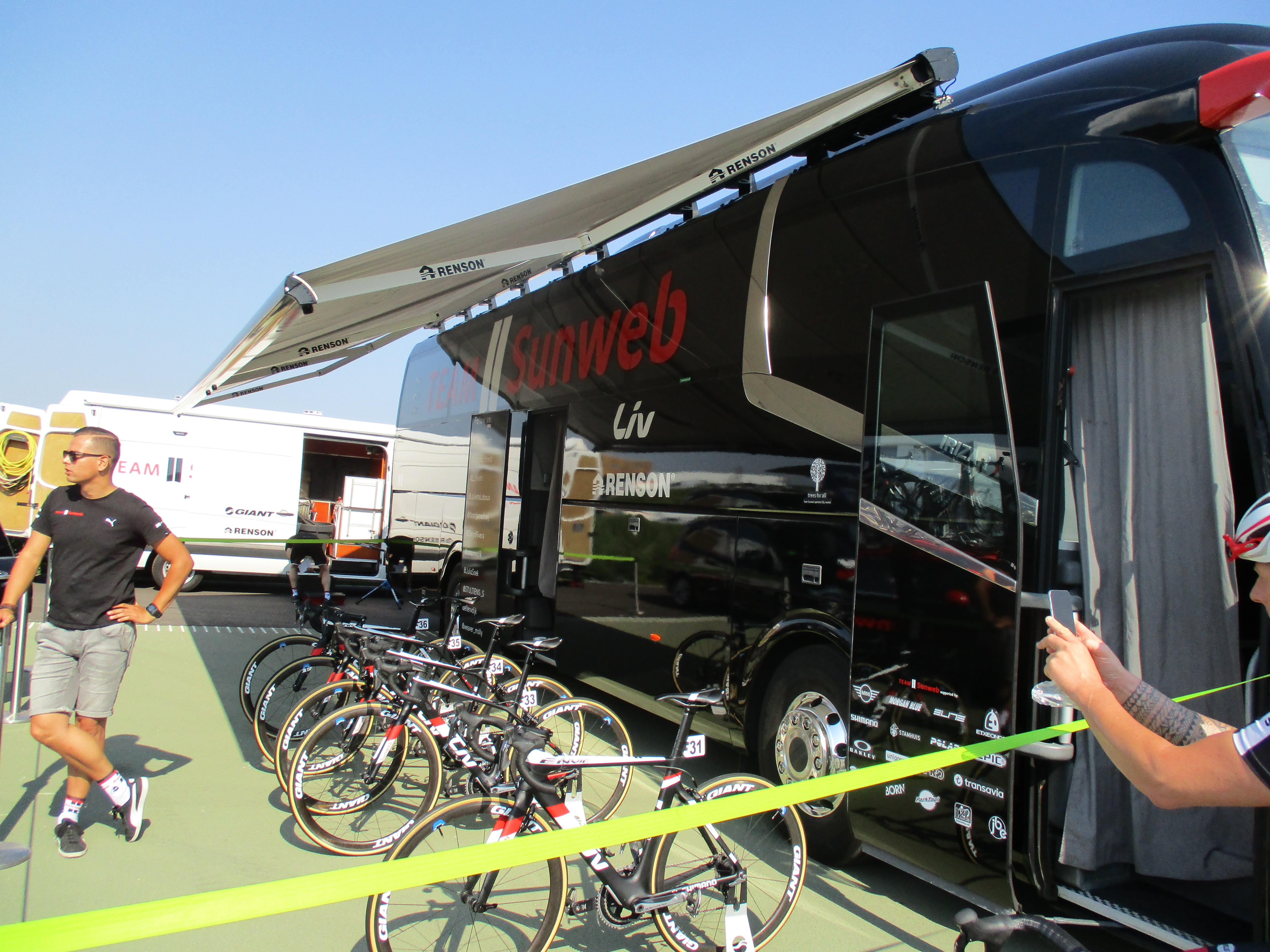 Start van de 6e etappe van de Boels Ladies Tour 2017 op het Tom Dumoulin Bike Park in Sittard-Geleen.